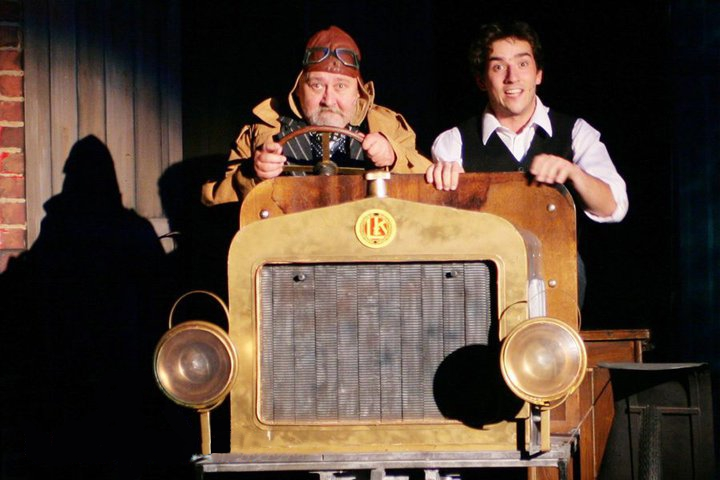 Snímek z inscenace "Dědeček automobil" autorů Adolfa Branalda a Radka Balaše. Na snímku Ota Jirák a Matouš Ruml.